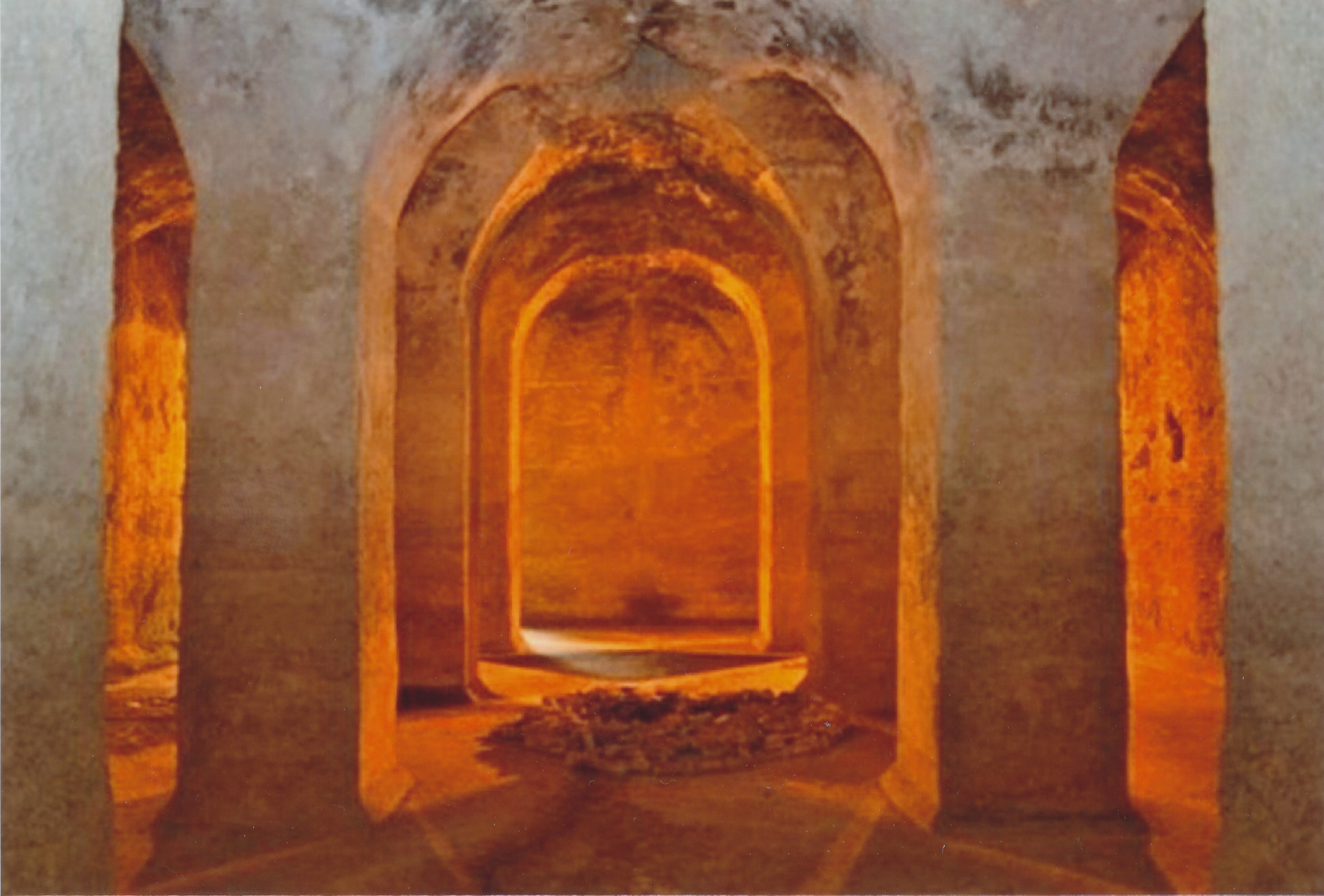 Gioiosa Jonica Naniglio interno illuminato